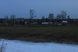 dorf сальниково